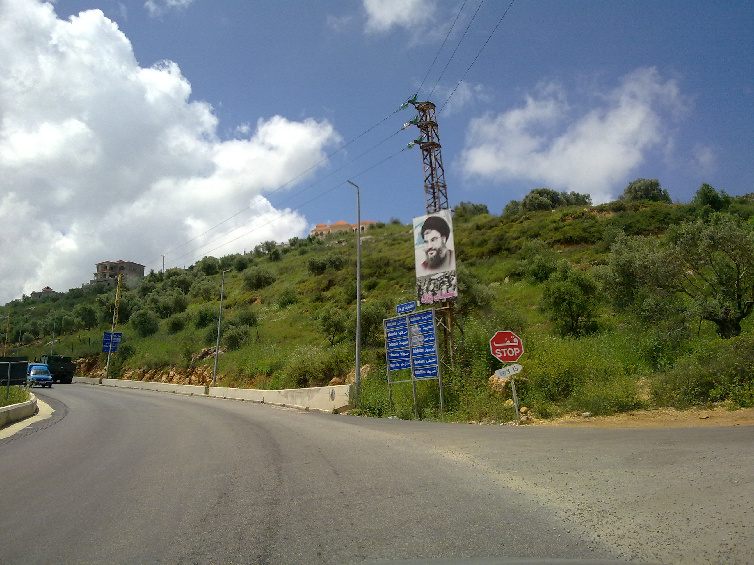 Kafr Kila, Lebanon